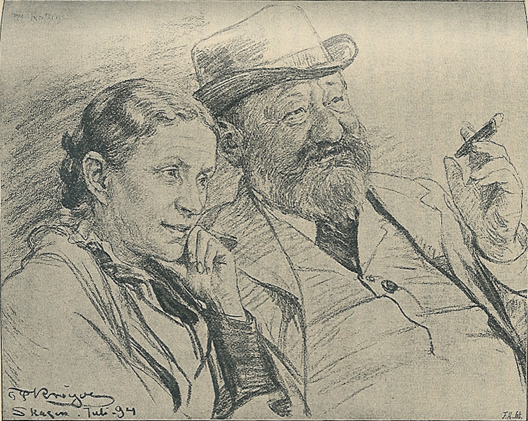 Sophus Schandorph med hustru, født Branner. Tegning fra 1894 af P.S. Krøyer.